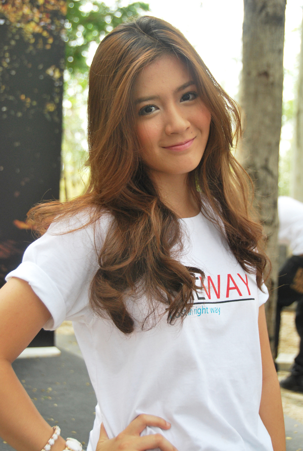 โฟกัส จีระกุล